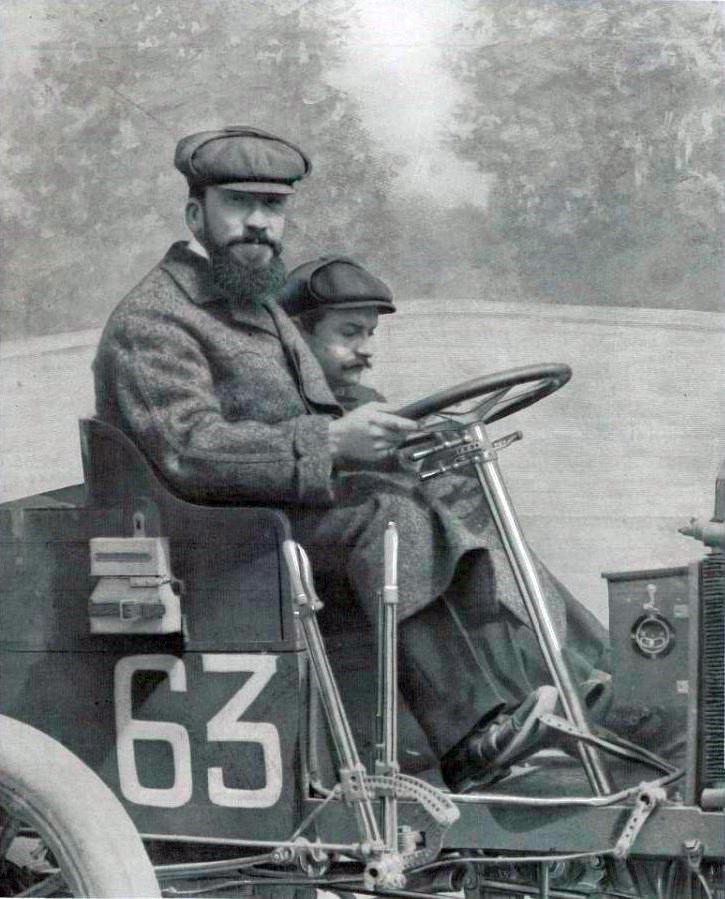 Marcel Renault con su chauffeur y mecanico René Vauthier en la carrera Paris-Madrid.